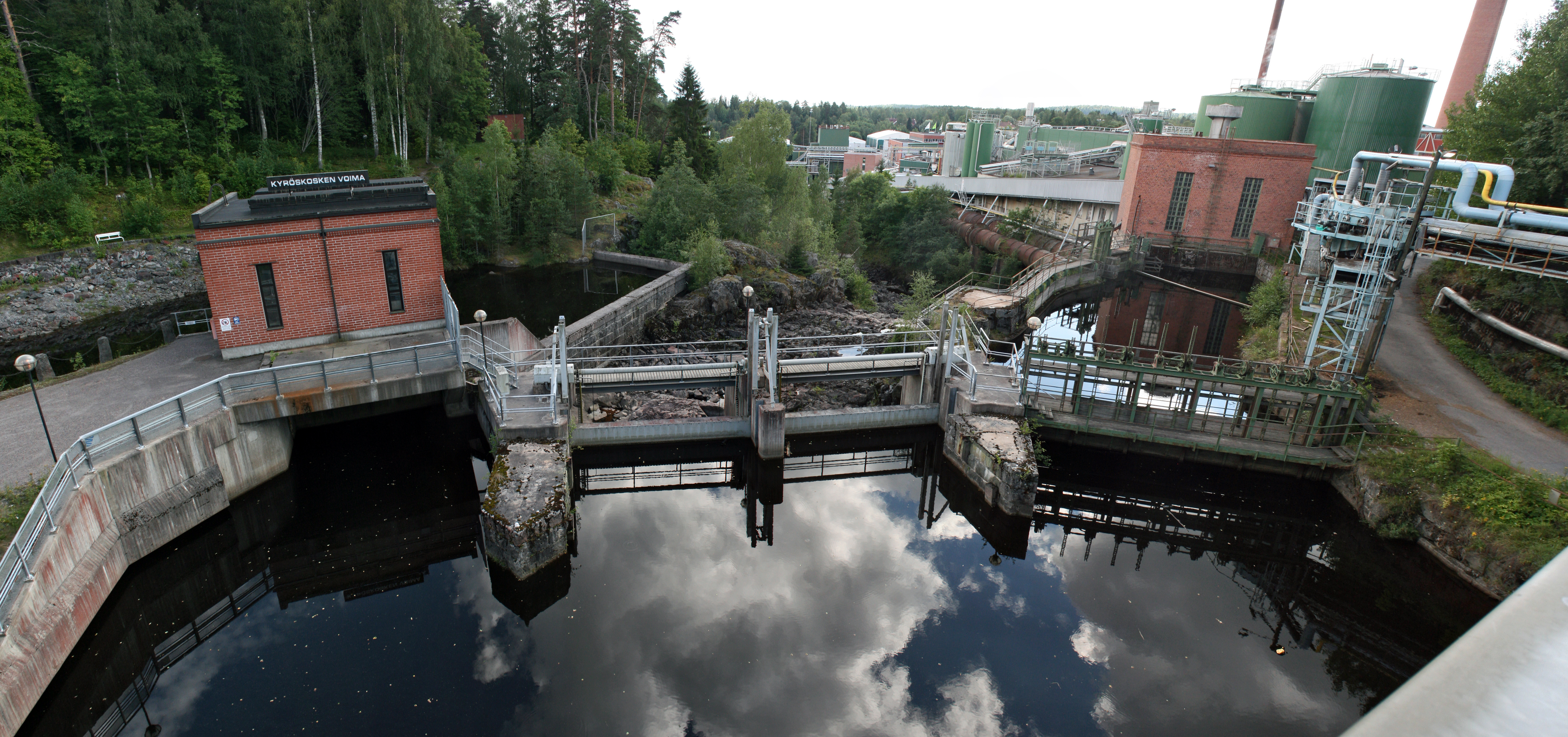 Kyröskosken voimalaitosalue kuvattuna pohjoisesta